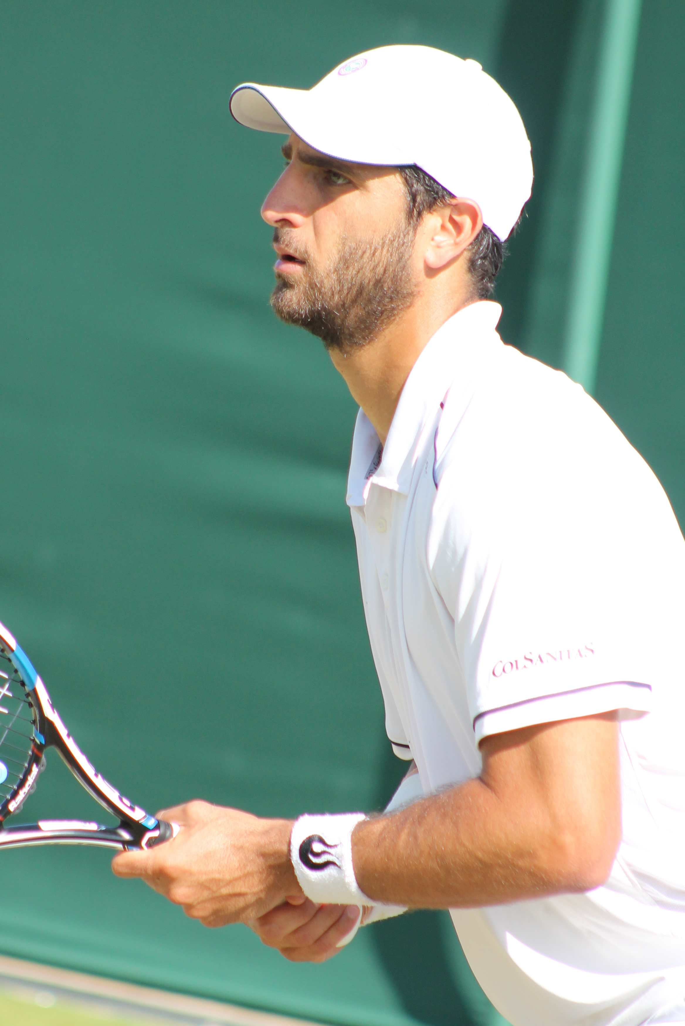 Farah WM15